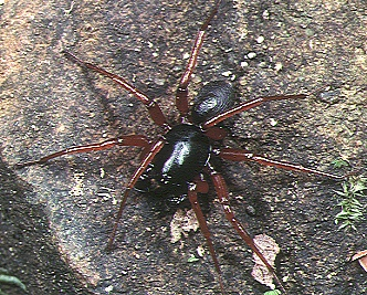 male Mallinella fulvipes from Okinawa.